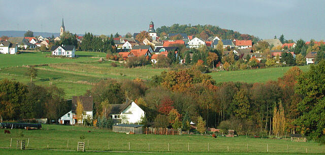 Ortsansicht Dörrebach